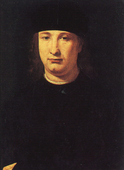 The Poet Casio 1490-1500 Oil on wood Galleria degli Uffizi, Florence